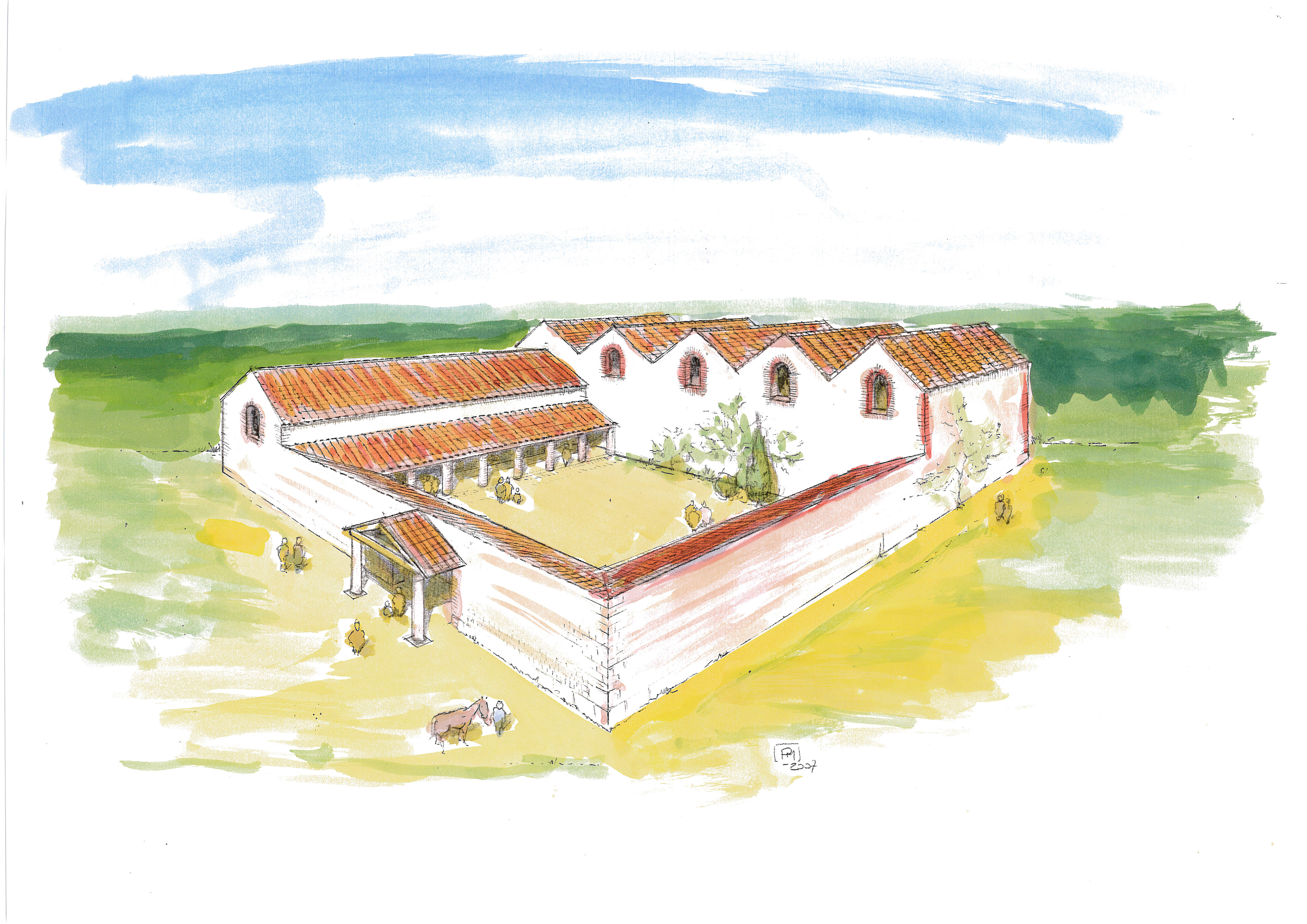 Proposition de restitution des thermes de Cherré. Dessin original de Pascal Mariette.